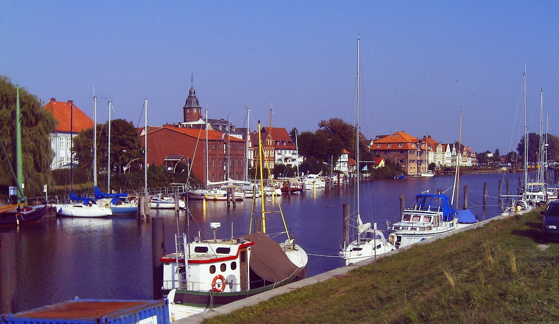 Glückstadt, Germany